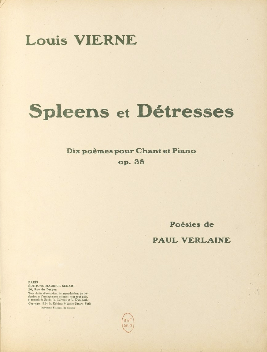 Spleens et Détresses de Louis Vierne. Notice BNF (